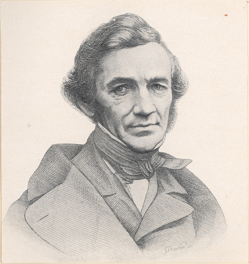 Ernst Rietschel, gestochen von Julius Thaeter.